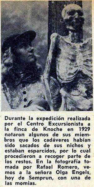 Foto de una momia hallada en la hacienda del Dr. Knoche con la doctora Olga Engels en 1929.